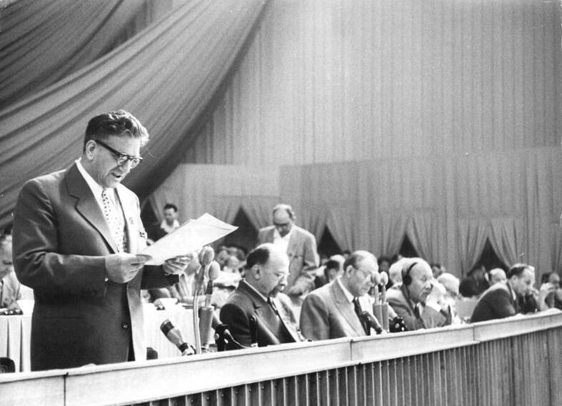 Zentralbild Ulmer 16.7.1958. V. Parteitag der SED vom 10. bis 16.7.1958 in der Werner-Seelenbinder-Halle, 7. Tag. UBz: Der Erste Sekretär der Bezirksleitung Schwerin der SED, Bernhard Quandt, der den Vorsitz der Schlußsitzung hatte, verlas Grussadressen, die von Betrieben an den Parteitag gerichtet wurden.